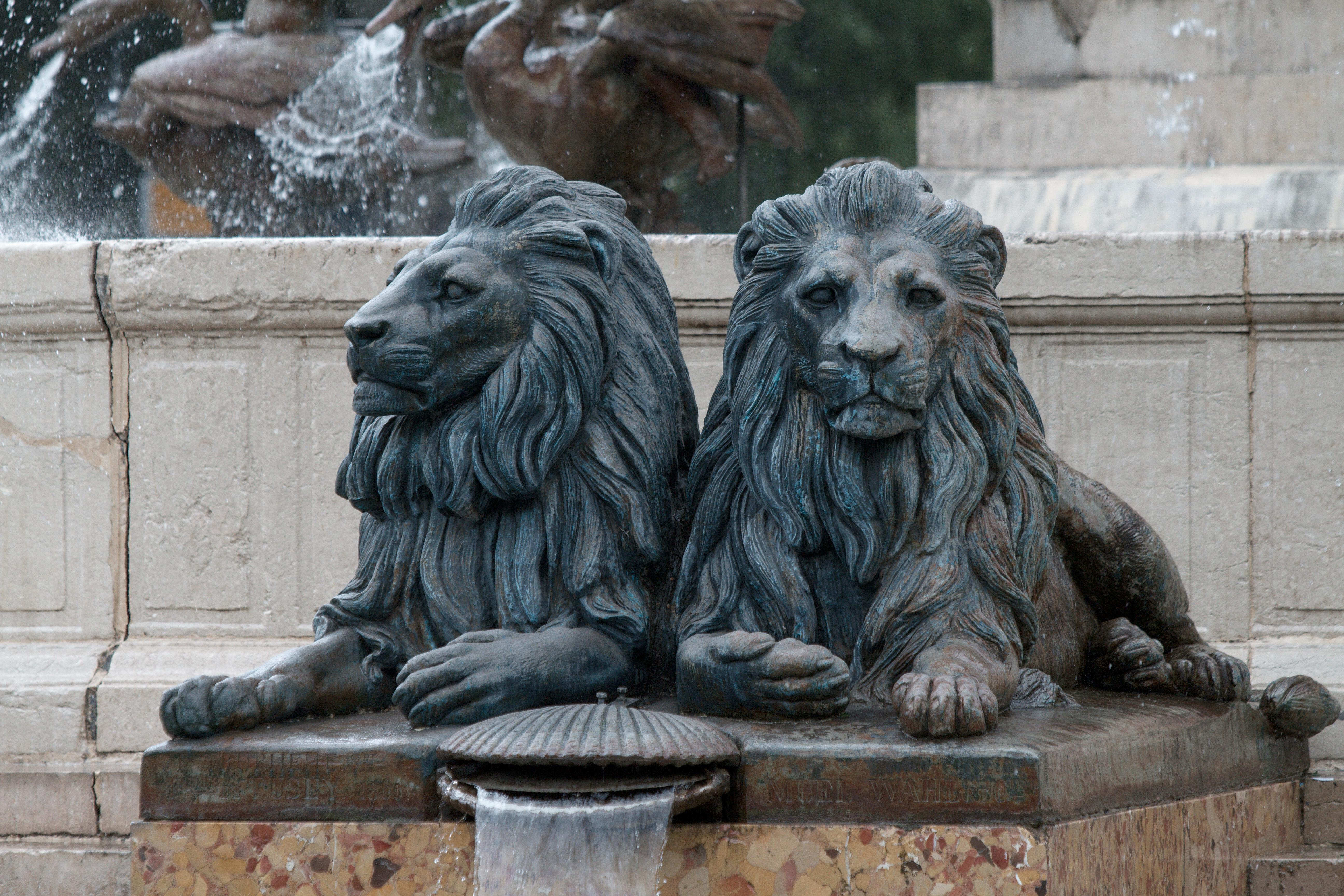 Fontaine de la Rotonde, Aix-en-Provence (France).